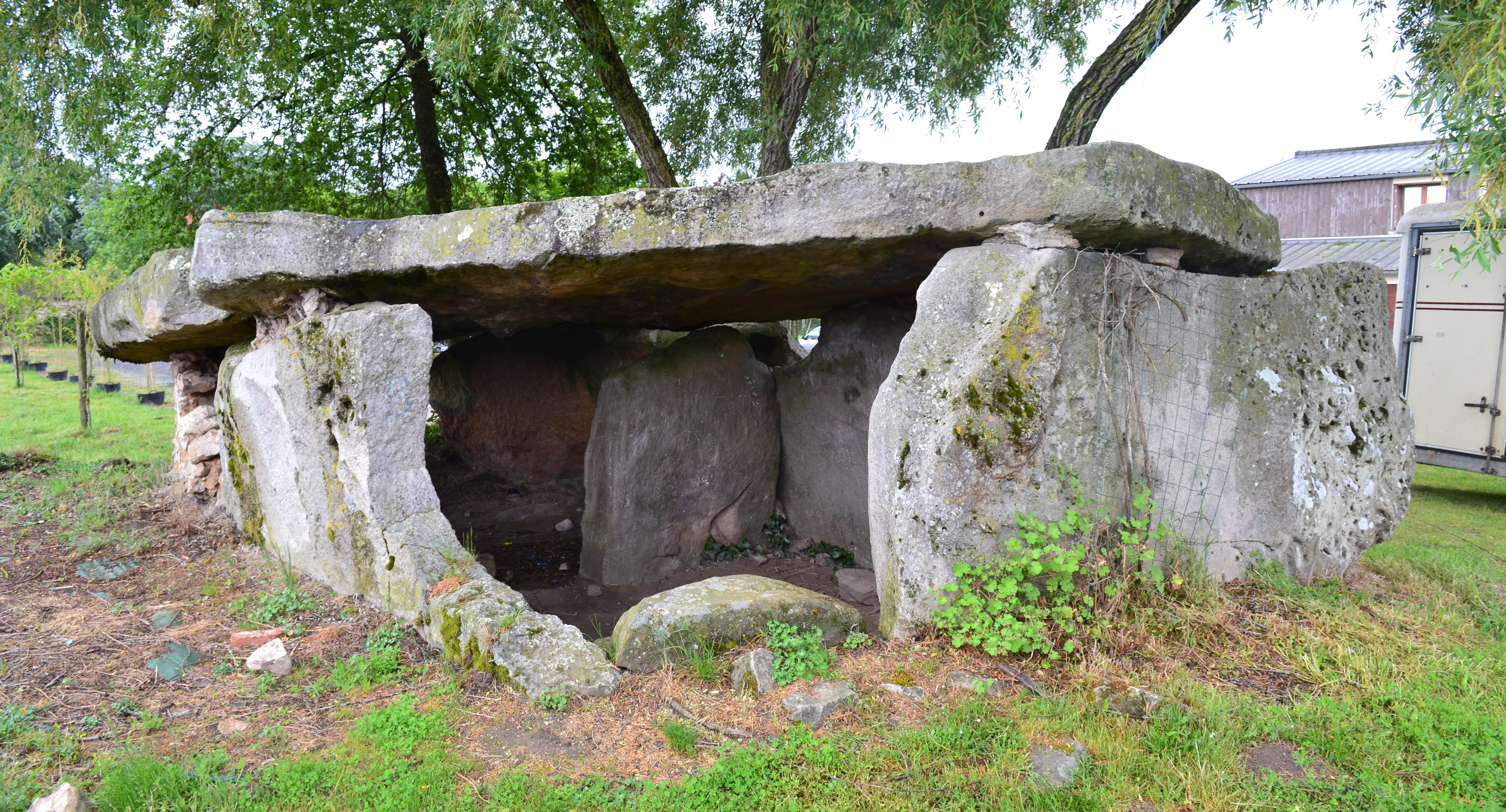 Dolmen du Bois du Feu, Saint-Hilaire-Saint-Florent